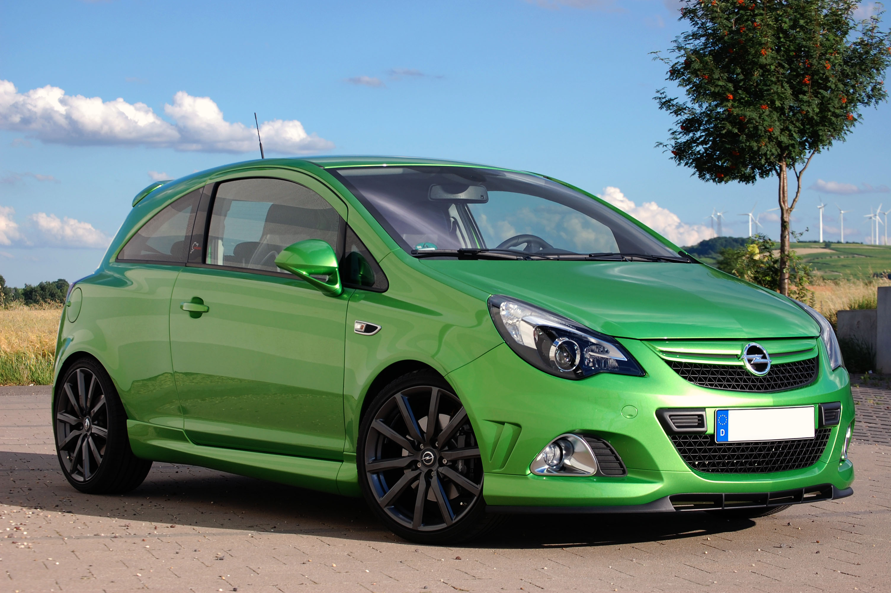 Corsa OPC Nürburgring Edition Vorne